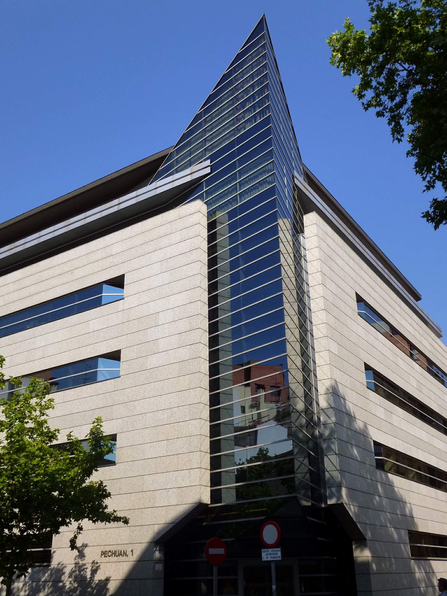 Edificio Pechuán (Madrid)